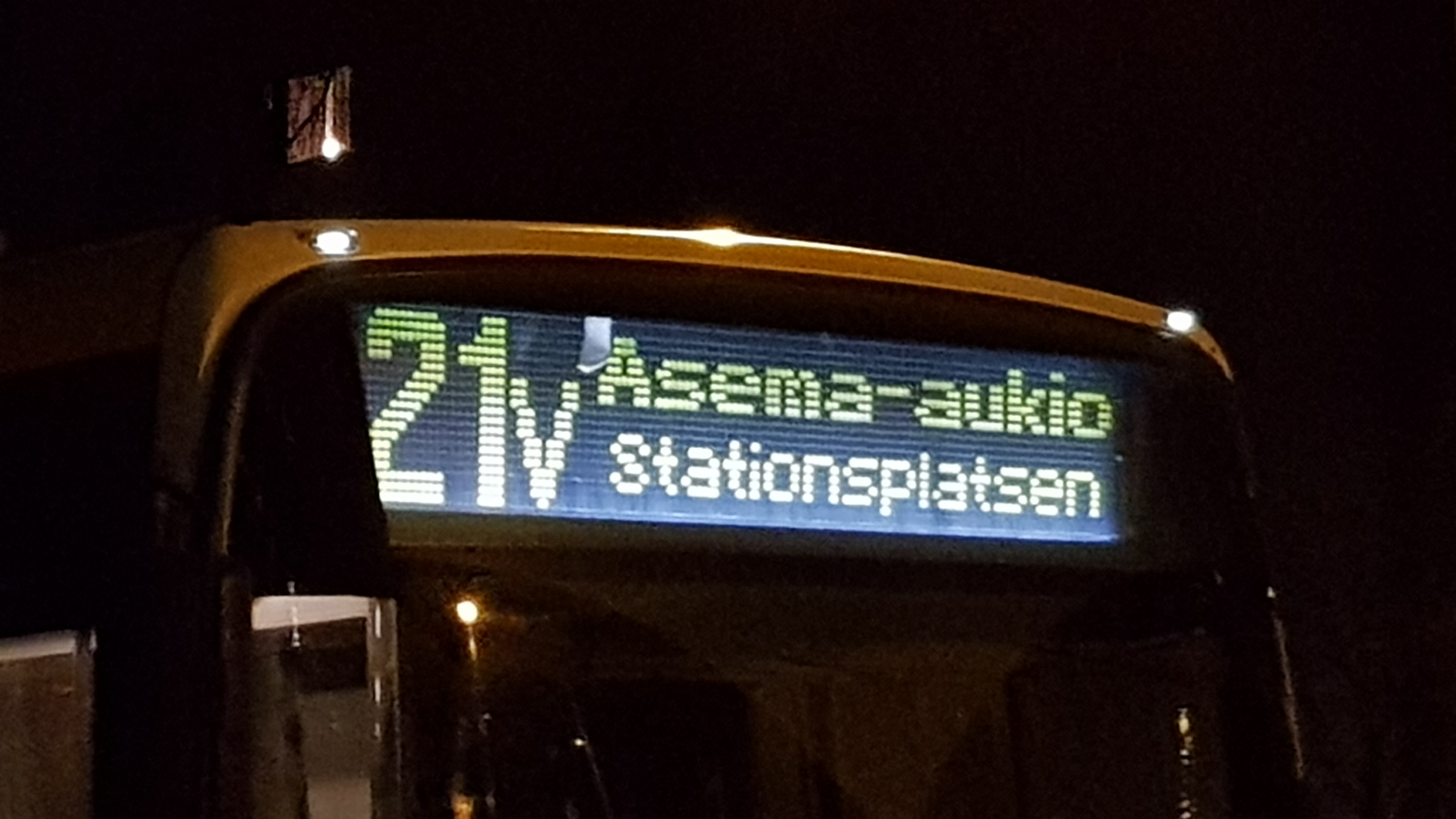 Lähikuva Transdev 202:n kääntöpistekilvestä.